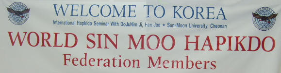 SUN MOON UNIVERSITY - CHEONAN - KOREA